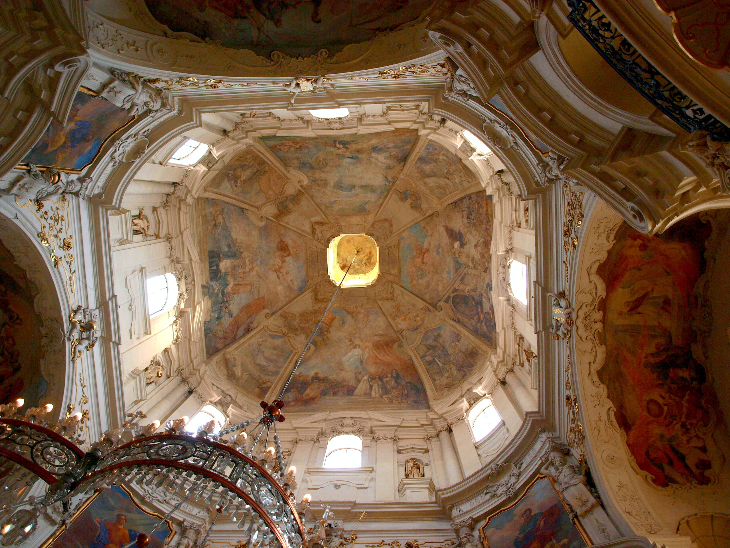 Chrám svatého Mikuláše na Starém Města pražském